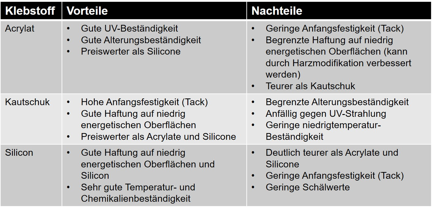 Die Tabelle beschreibt die Vor- und Nachteile der drei gängisten Haftklebstofftechnologien